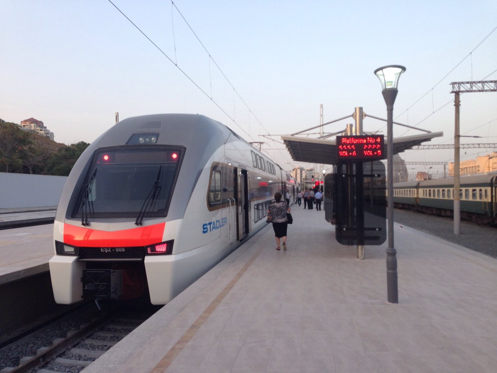 Электропоезд Сумгаыйт-Баку